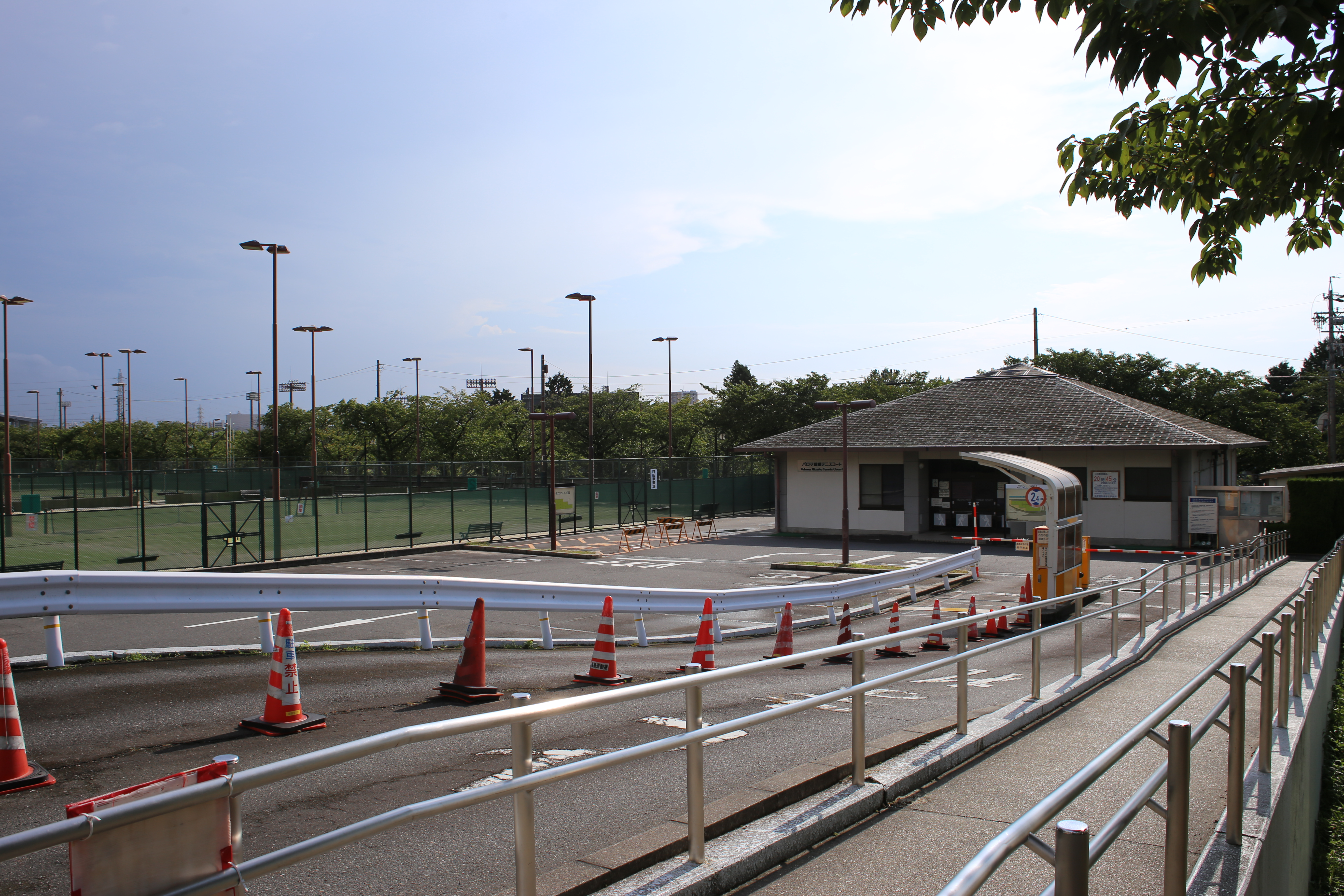 名古屋市瑞穂区の瑞穂公園テニスコート・クラブハウス